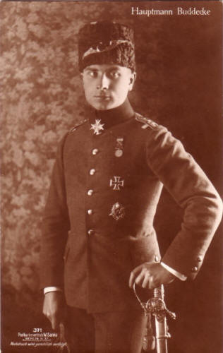 Hauptmann Buddecke (El Schahin), Einer der ersten Pour-le-merite Träger der dt. Luftstreitkräfte.